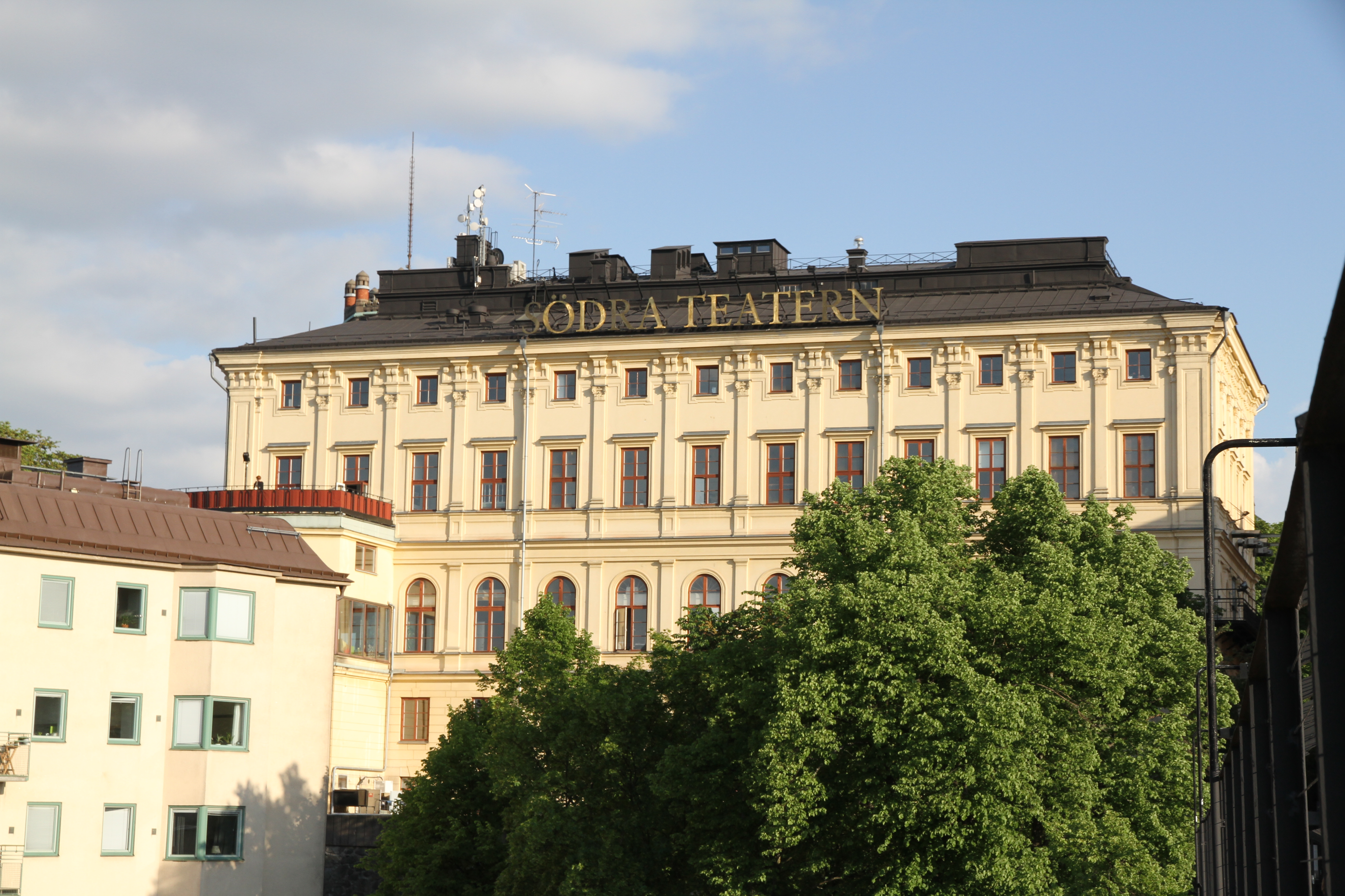 Södra Teatern, Stockholm från Katarinahissen.